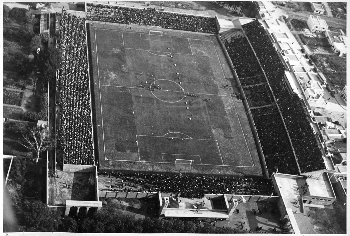 Imagen aérea del estadio Gran Parque Central, durante la reinauguración de 1944, con victoria de Nacional por 6 a 0 ante la selección de la AUF.